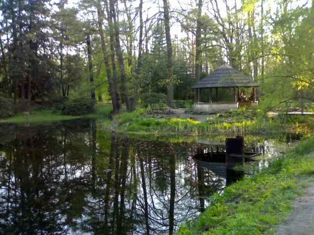 Brynek, ogród botaniczny